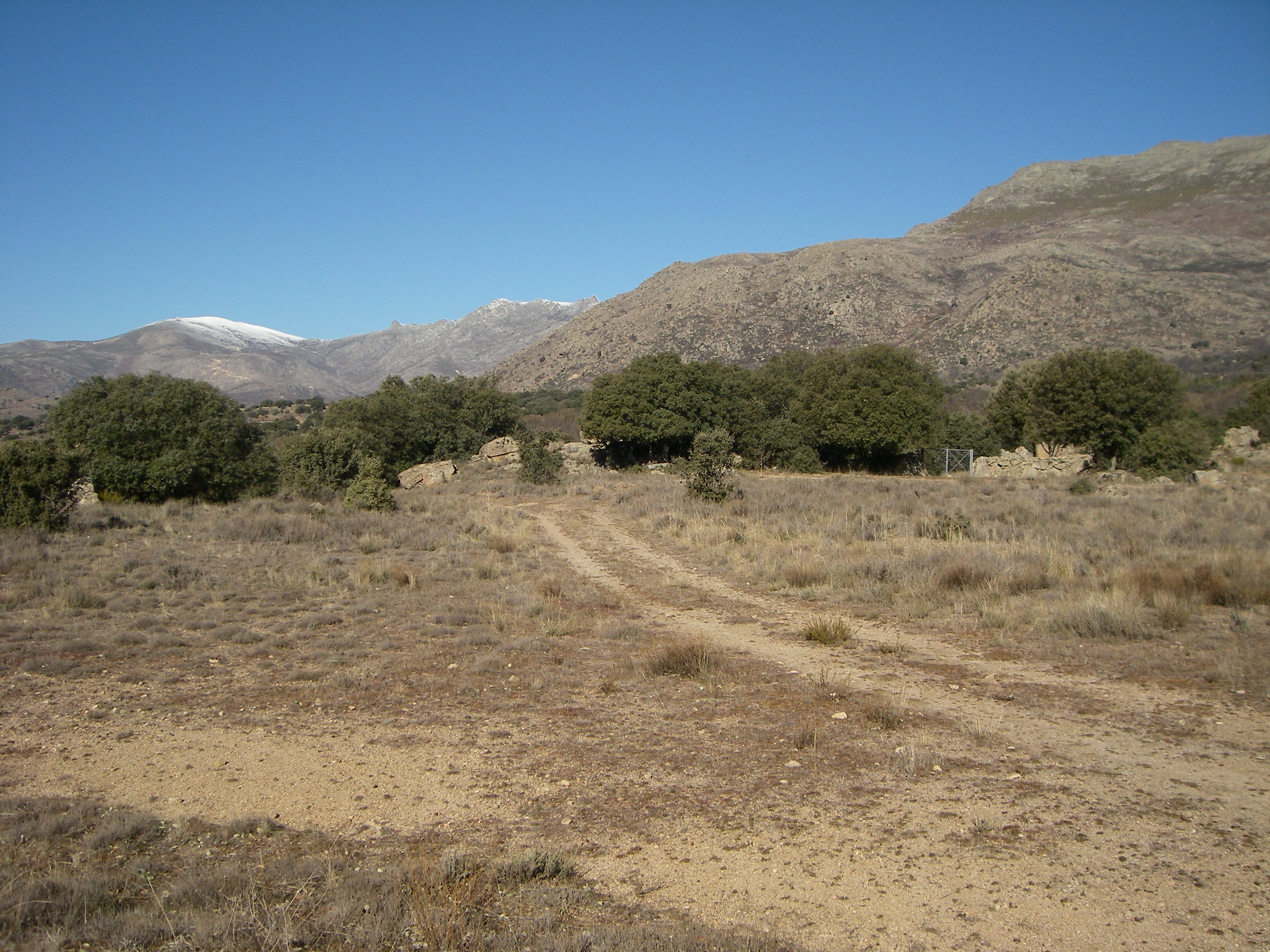 Vistas desde Navalmoral de la Sierra , del Peña la Graja y al Fondo el Pico del Zapatero y el portacho del Zapatero Nevado This is a photography of a Site of Community Importance in Spain with the ID: ES4110034. Natura2000 entry, EEA entry